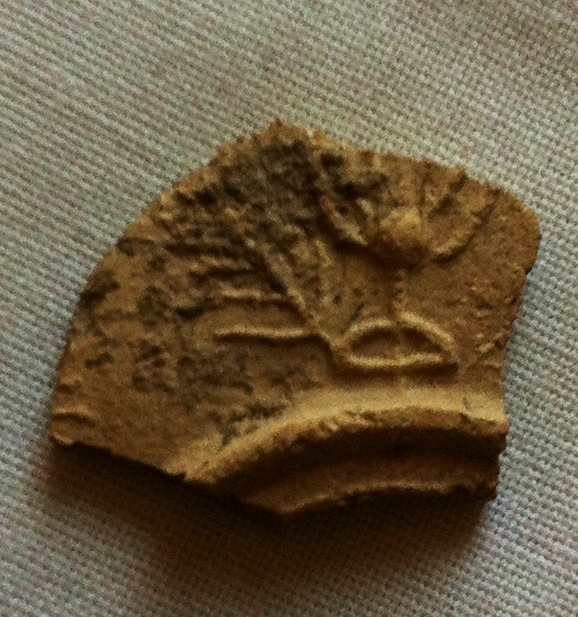 שיחין היה יישוב עתיק מתקופת בית שני והתלמוד ששכן ליד ציפורי. בשנת 2012 החלו באתר חפירות ארכולוגיות שבר מחרס של נר מעוטר במנורה ולולב